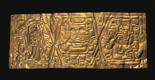 Adorno frontal de oro Chavin. Museo Larco.